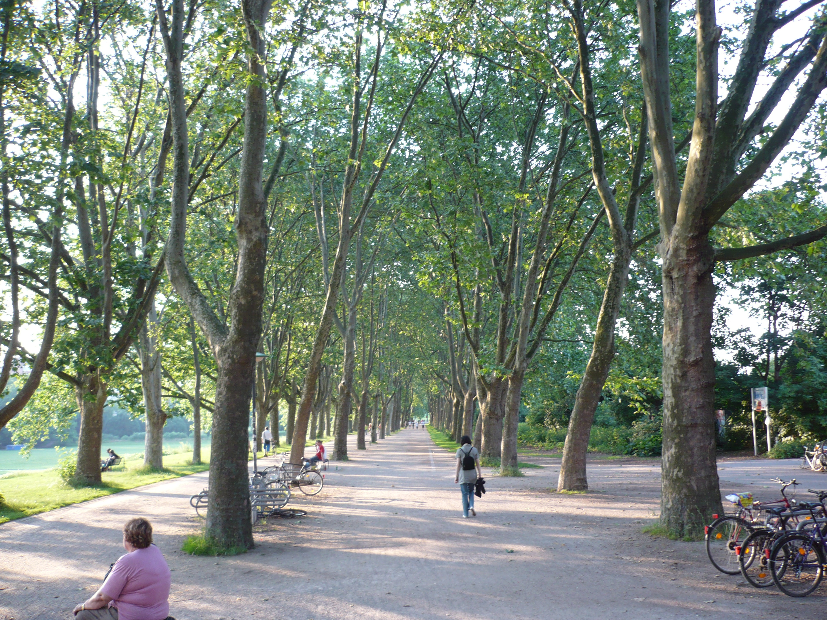 Der nach Alphons Silbermann benannte Alphons-Silbermann-Weg in Köln verbindet die Bachemer Straße und die Zülpicher Straße zwischen der Uniwiese (rückwärtig des Hauptgebäudes der Universität zu Köln) und der Hauptmensa.